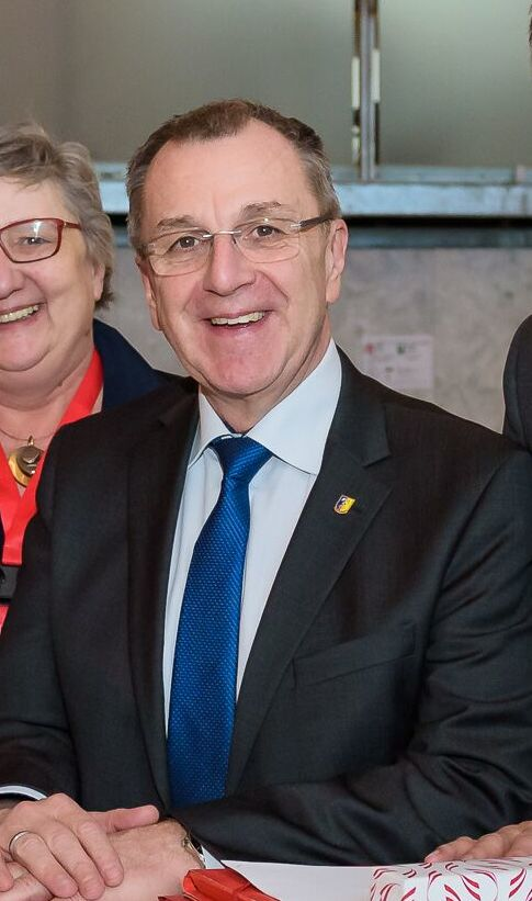 Kommunalpolitik im Parlament - Ein Austausch über Herausforderungen mit unseren Bürgermeisterinnen.